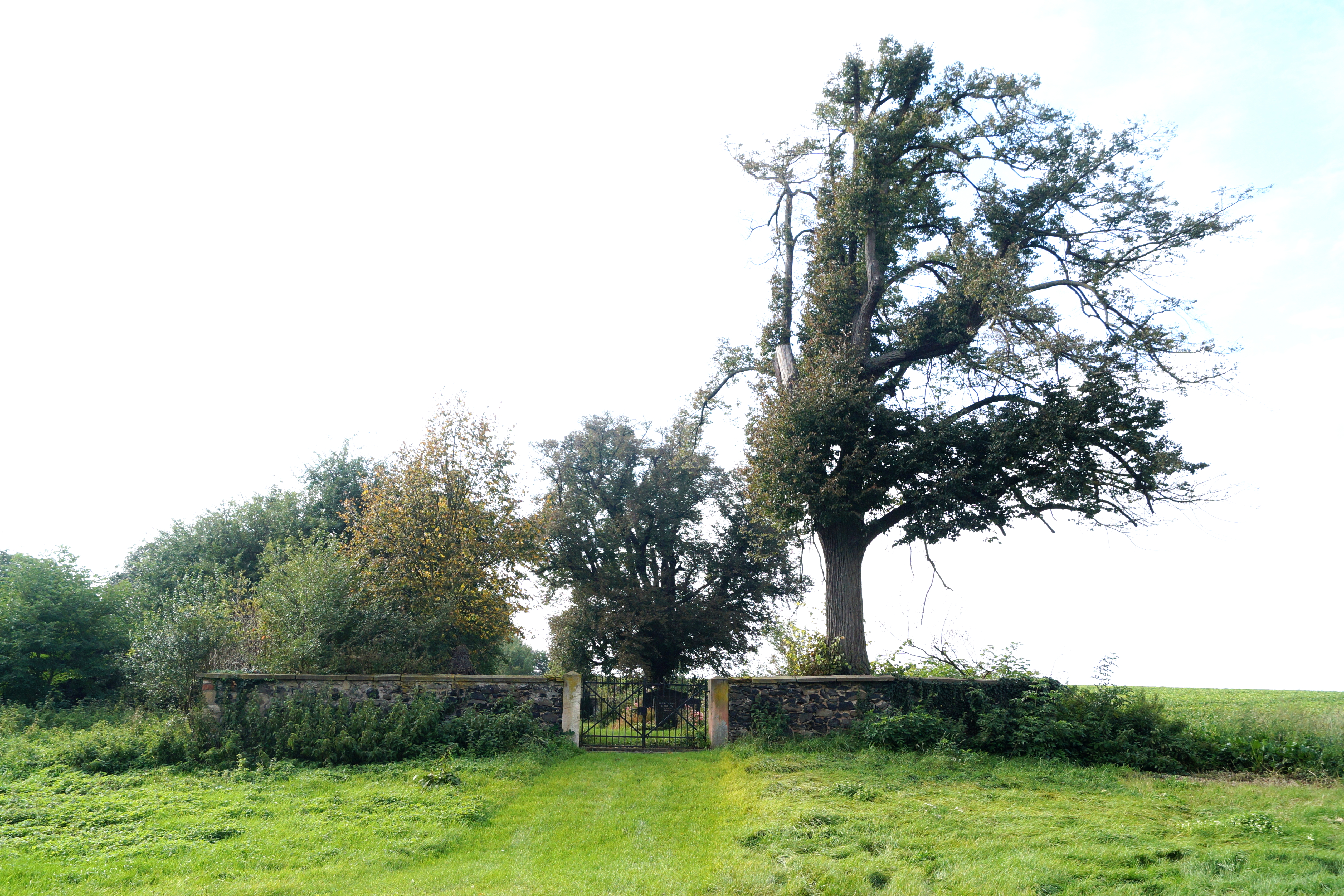 Friedhof des Ortes Wickstadt (zu Assenheim, Stadt Niddatal, Wetteraukreis)